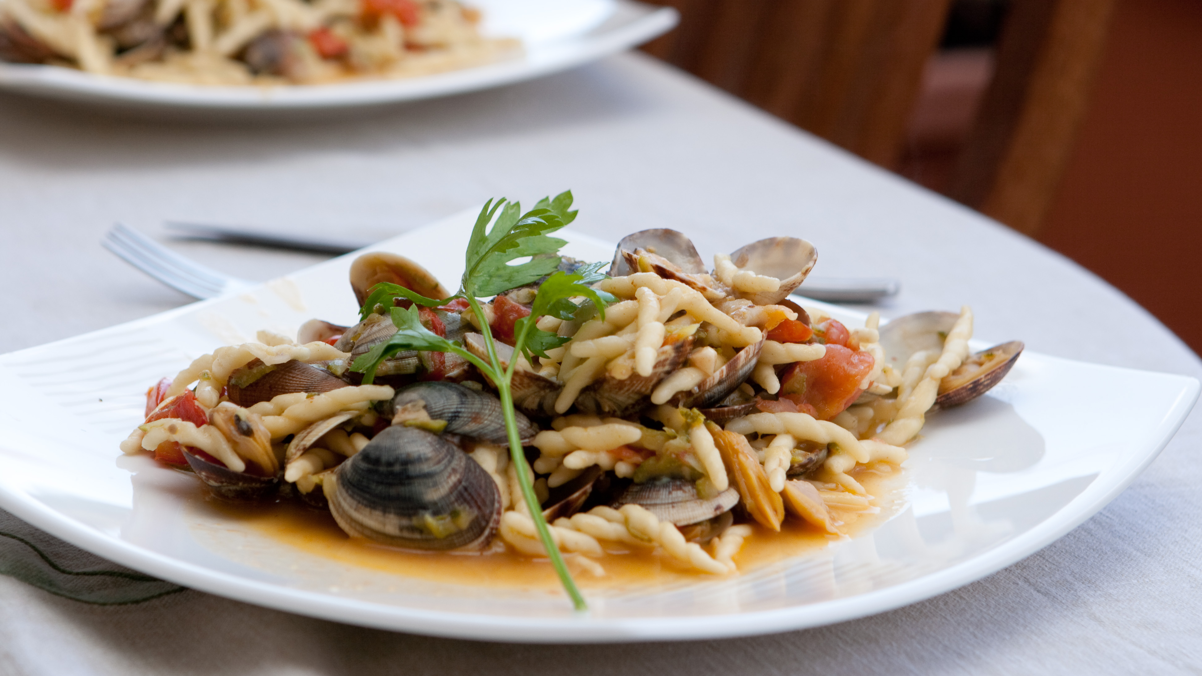 Trofie Vongole e Zucchine - IMG_6097